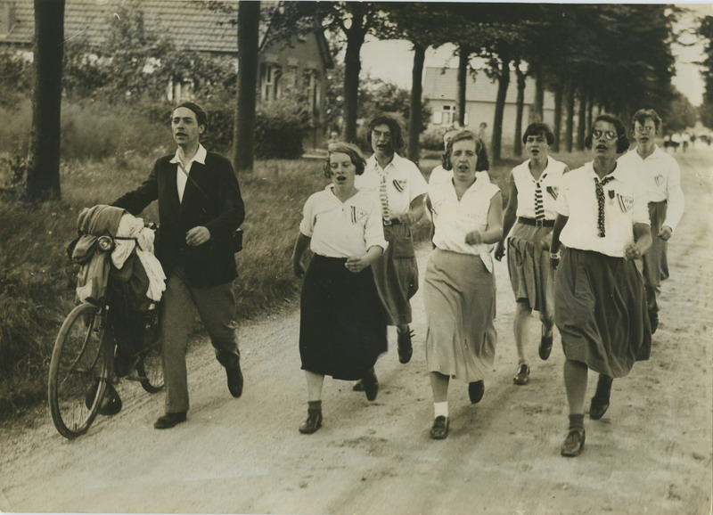 De vrouwelijke leden van de Rotterdamse wandelsportvereniging (RWV) onderweg tijdens de 22e vierdaagse.